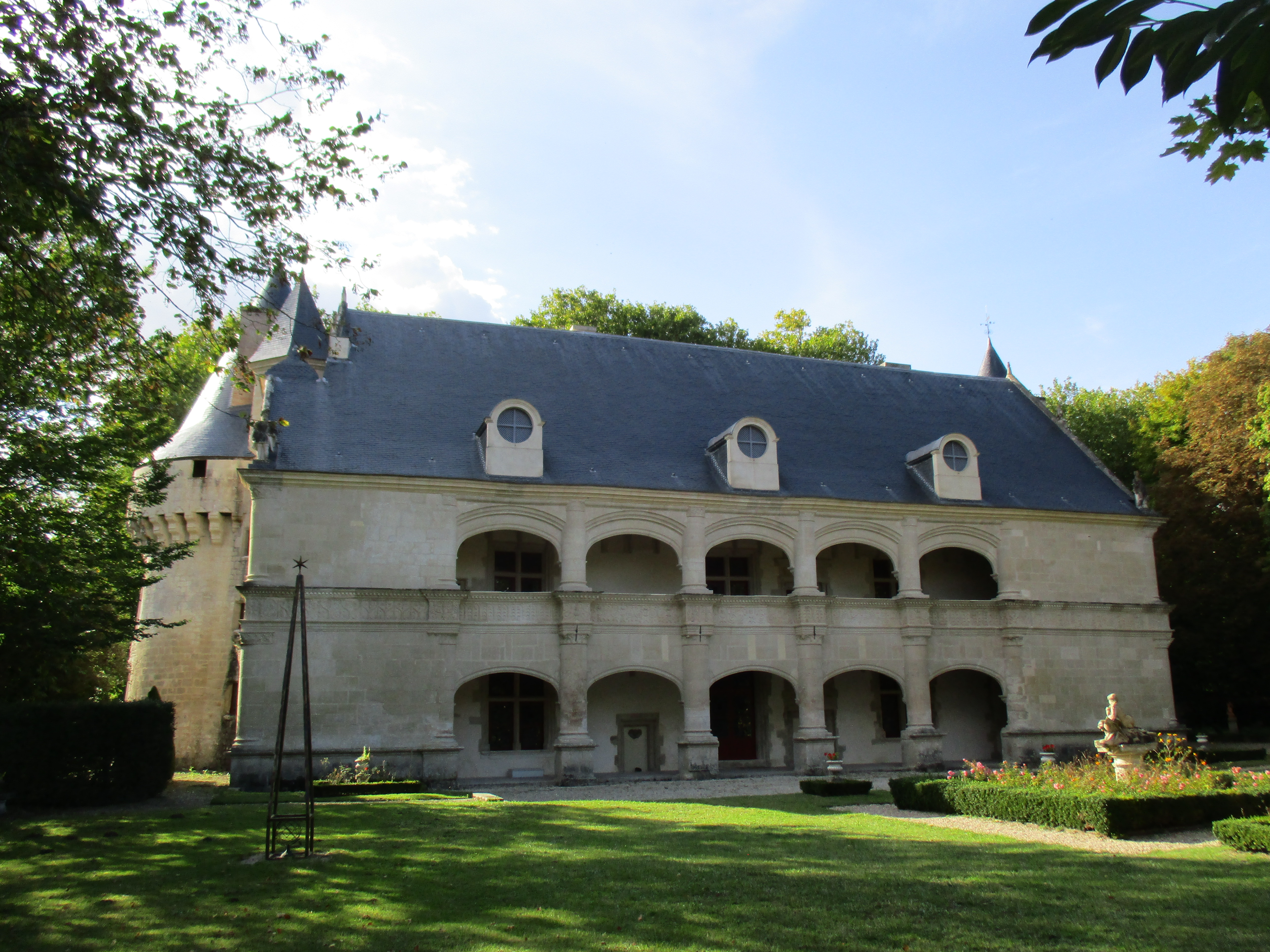 Façade du château de Dampierre-sur-Boutonne, vue sur les deux galeries.